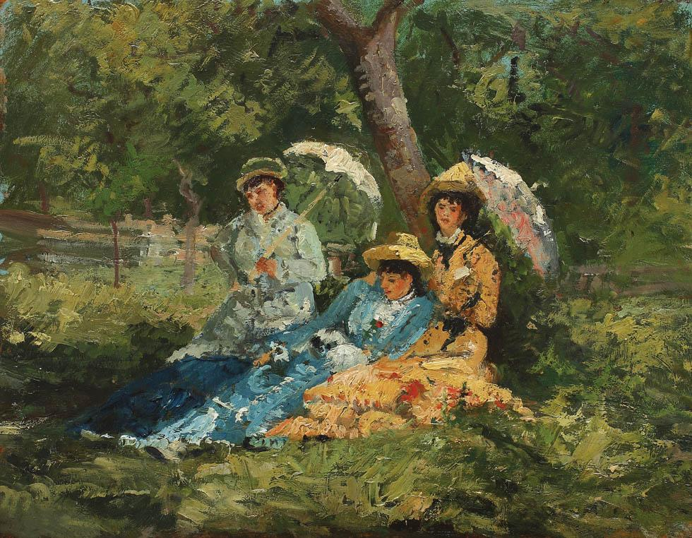 Ion Andreescu - Femei în parc, ulei pe lemn, 26 x 35 cm.